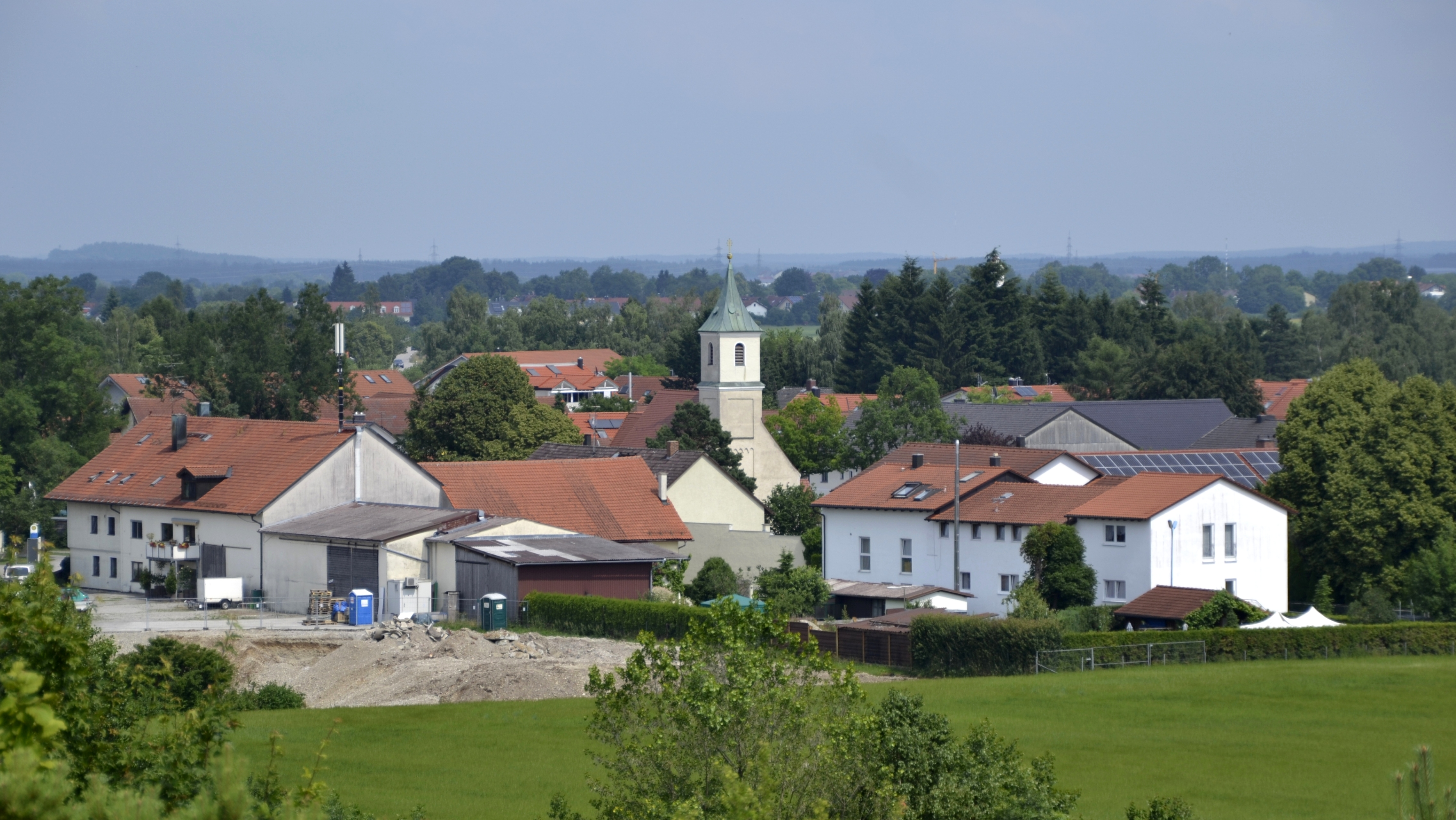 Der Gemeindeteil Salmdorf der Gemeinde Haar (bei München).